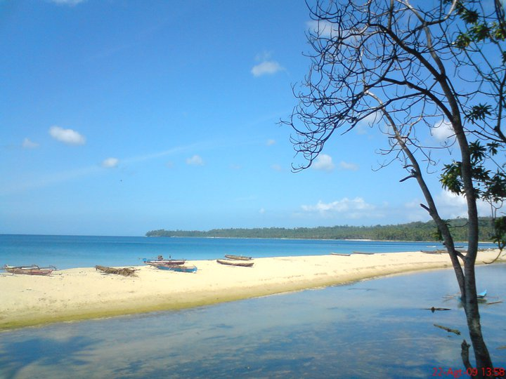 Sungai Desa Palam